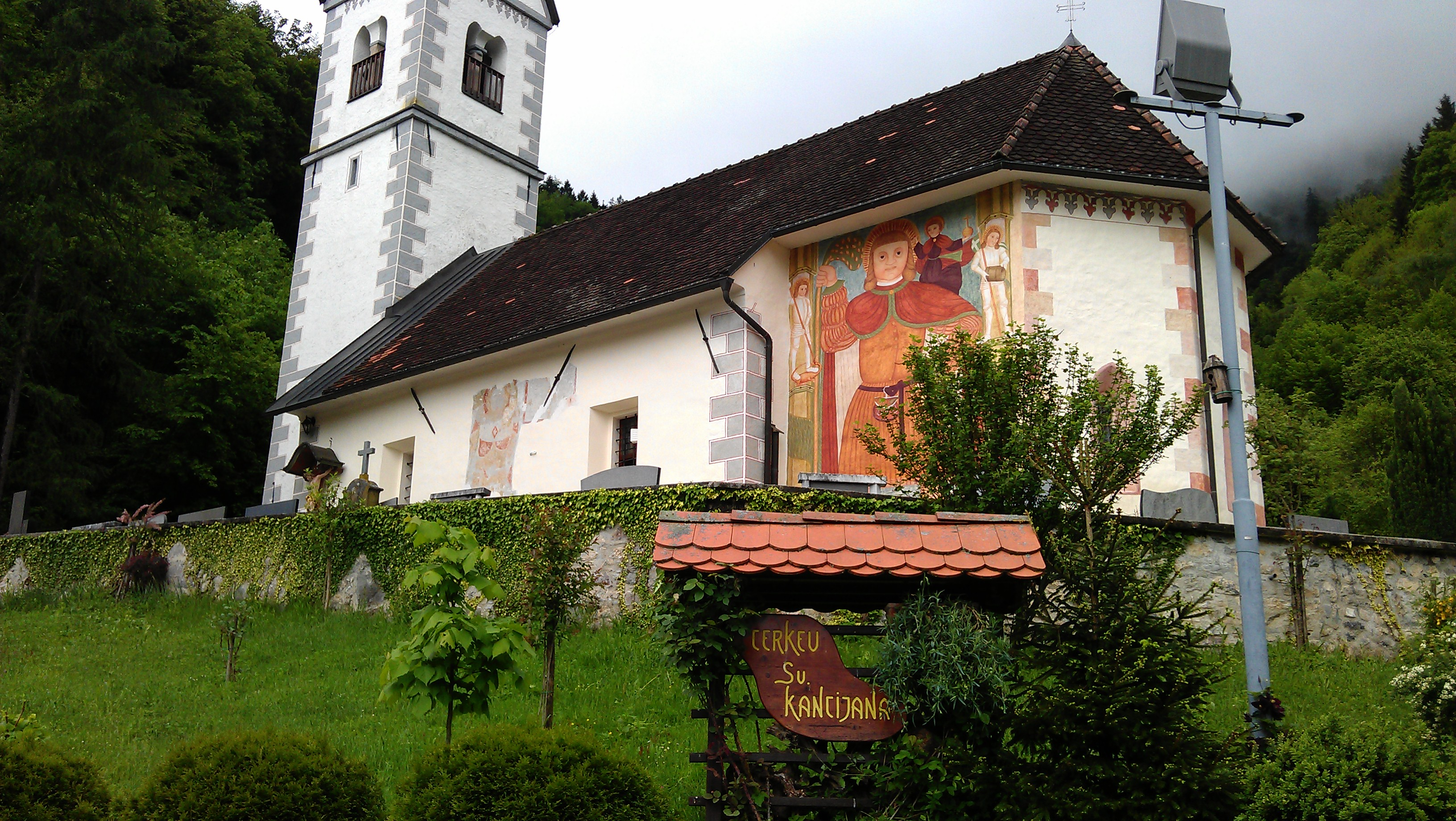 Cerkev Svetega Kancijana na Vrzdencu